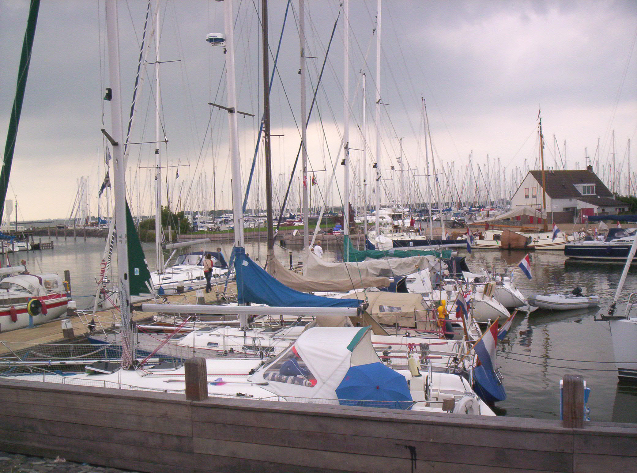 A hindeloopeni kikötő, Hollandia